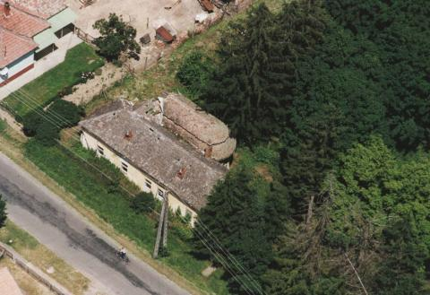 Újvárfalva, Hungary, aerialphotgraphy